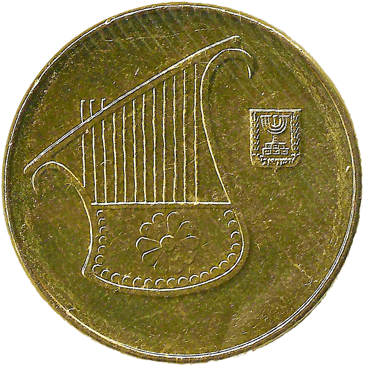 نصف شيكل إسرائيلي